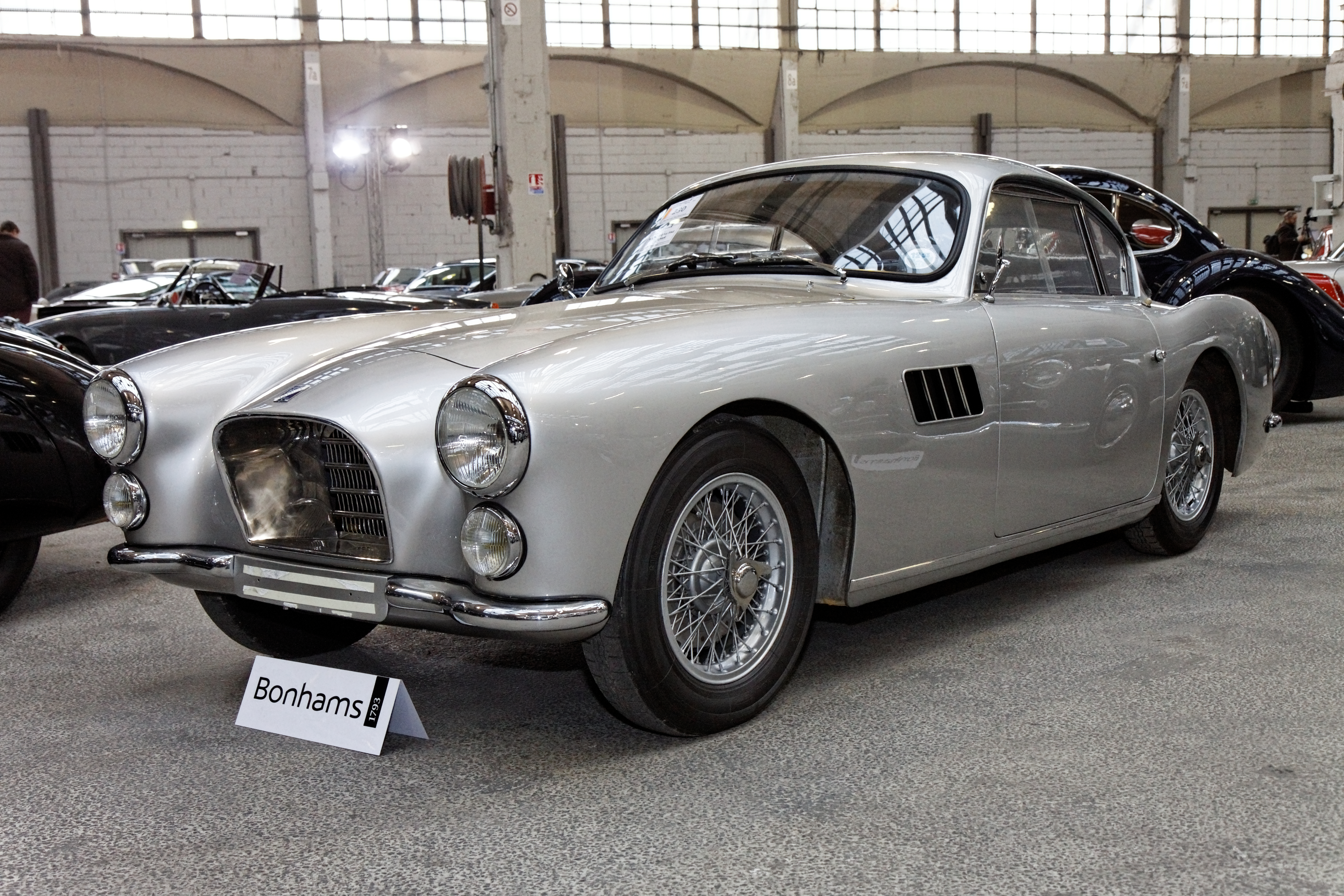 Talbot-Lago T14 LS Spécial Coupé